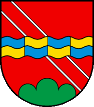 Wappen von Vuisternens devant Romont (Neu) Kanton Freiburg Schweiz